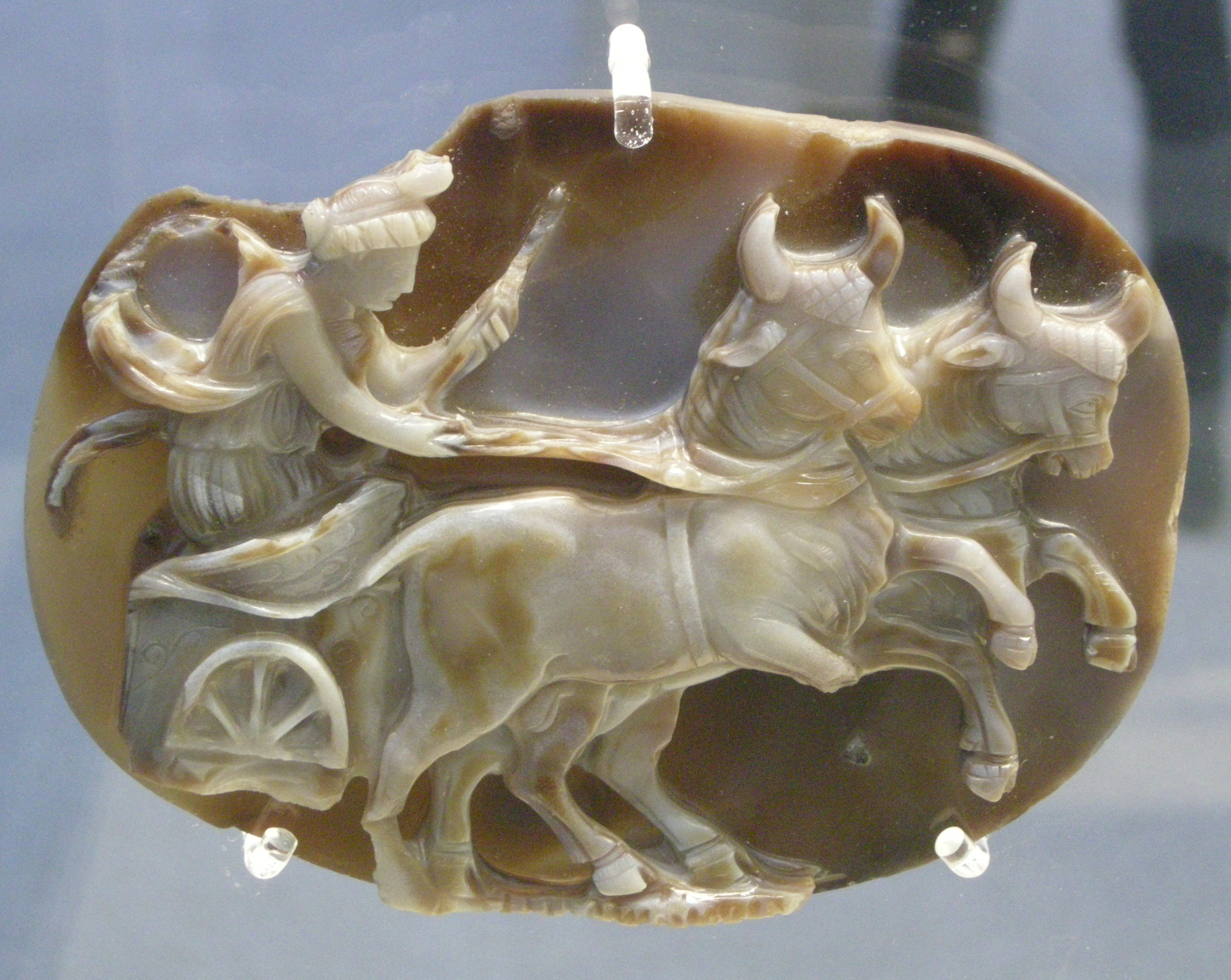 Arte romana, cameo in sardonice con guiulia domna come dea luna o syria, 193-217